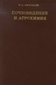 Якаў Мікітавіч Афанасьеў. Глебазнаўства і аграхімія